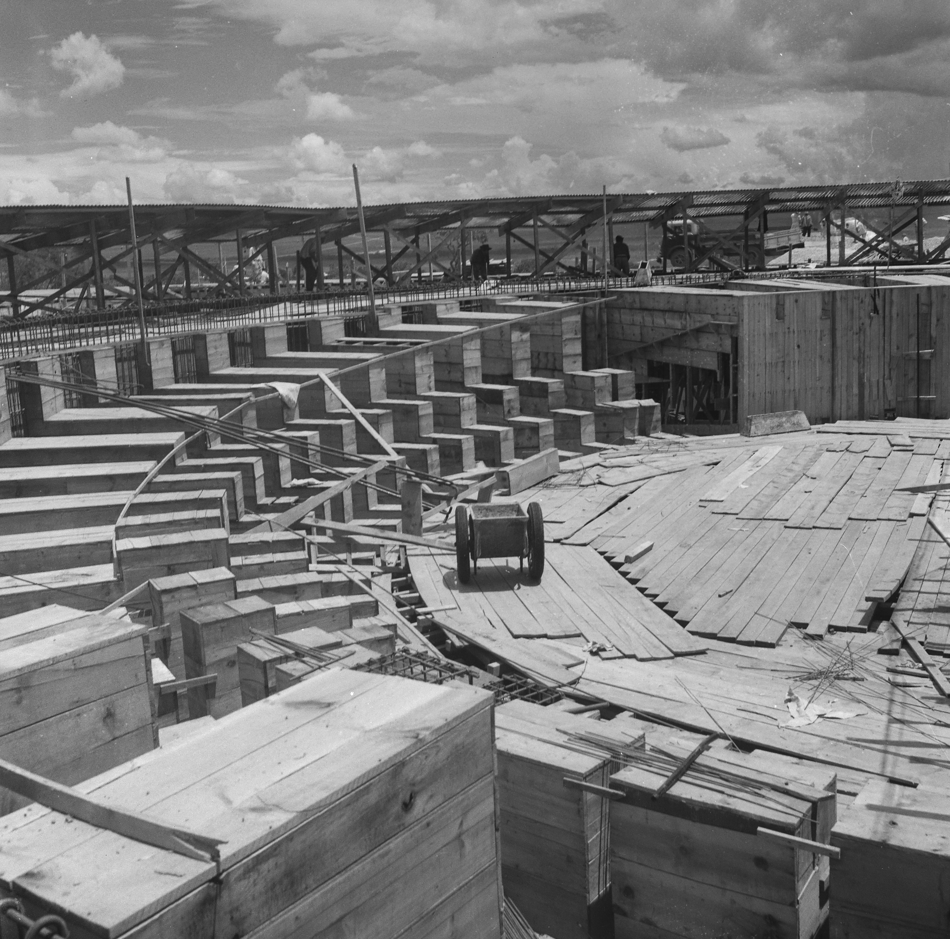 Obras de construção de Brasília - Congresso Nacional